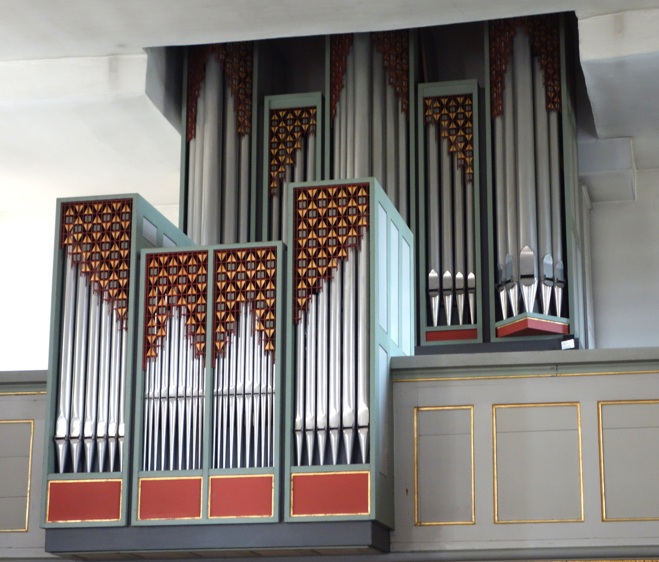 Orgel von St. Georg auf dem Berge, Ratzeburg, Schleswig-Holstein, Deutschland